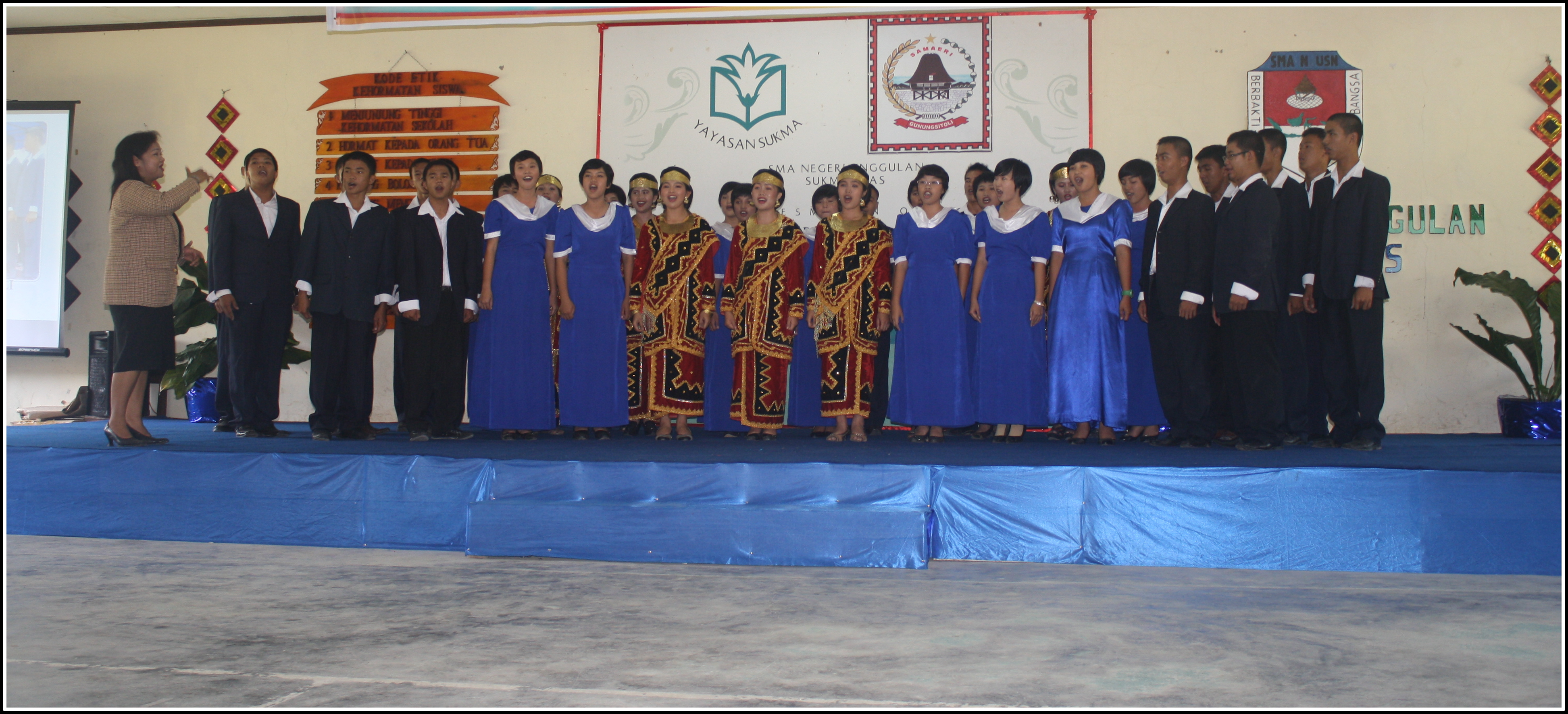 Paduan Suara